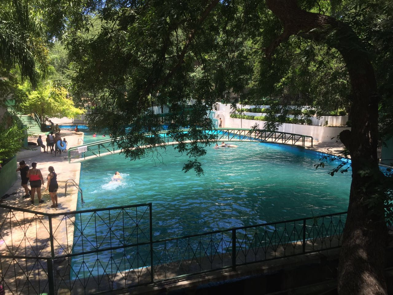 Alberca del Ojo de Agua de Sabinas Hidalgo, Nuevo León, México.